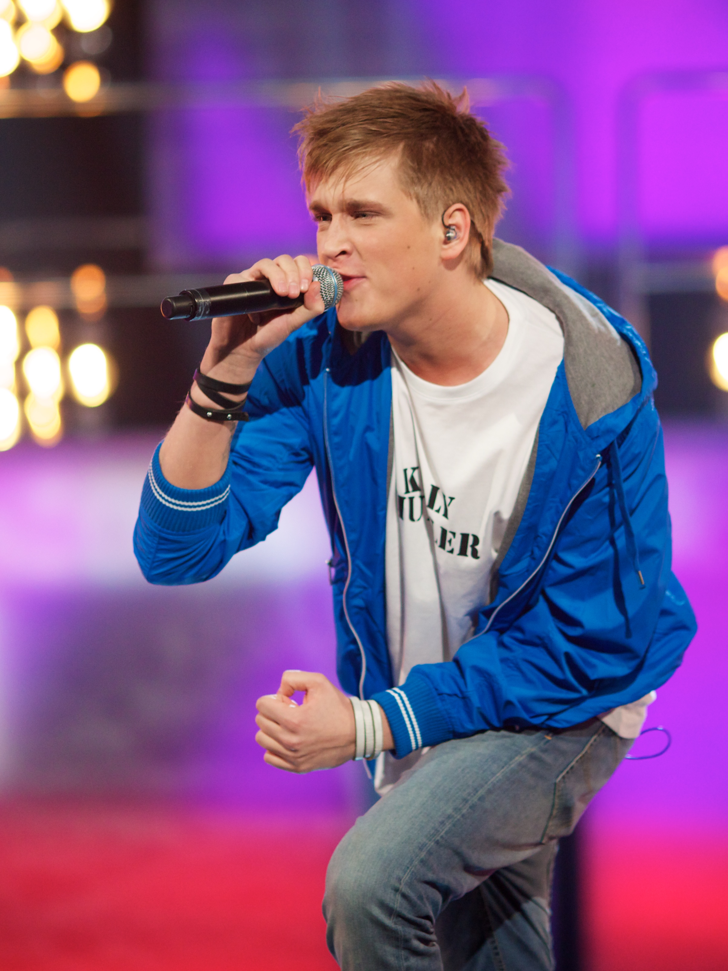 Pauseinnslag MPG Skien 2011